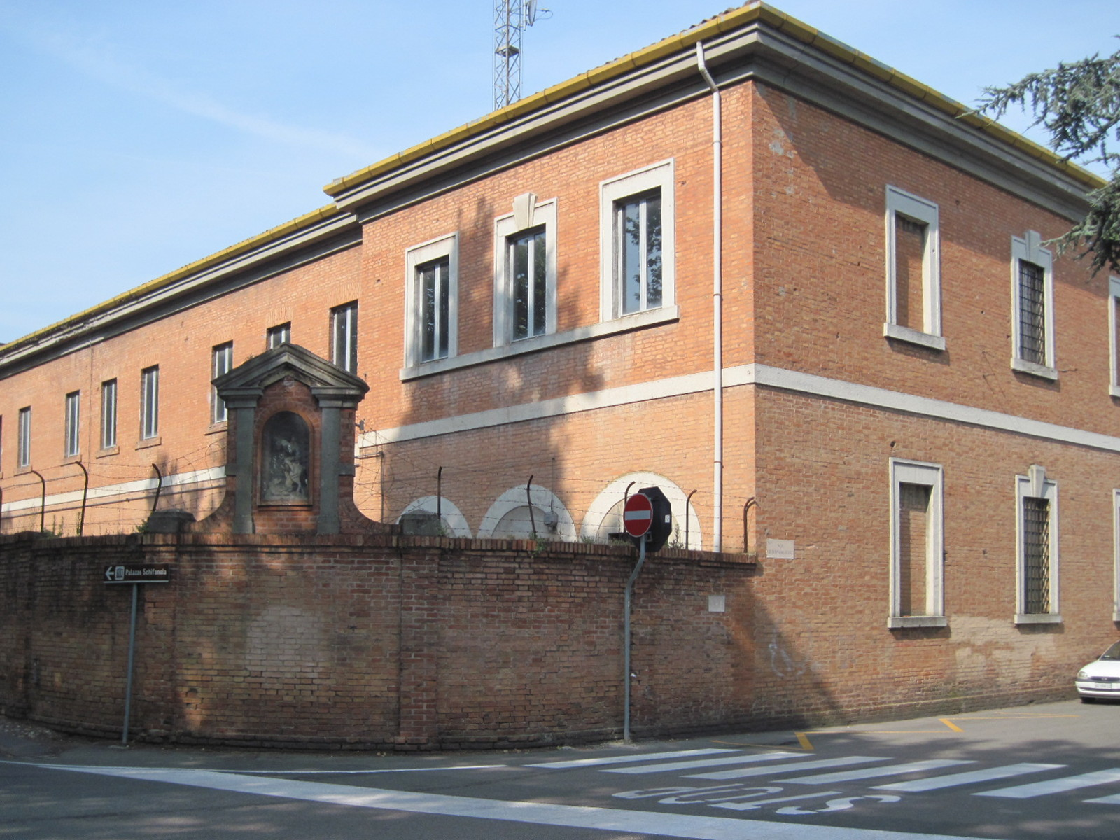 ex caserma dismessa in via Cisterna del Follo